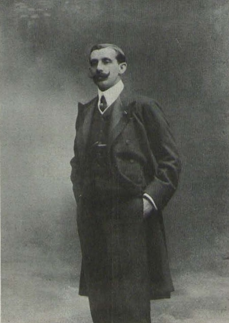 Conde de la Villanueva. Un distinguido aristócrata.KAULAK